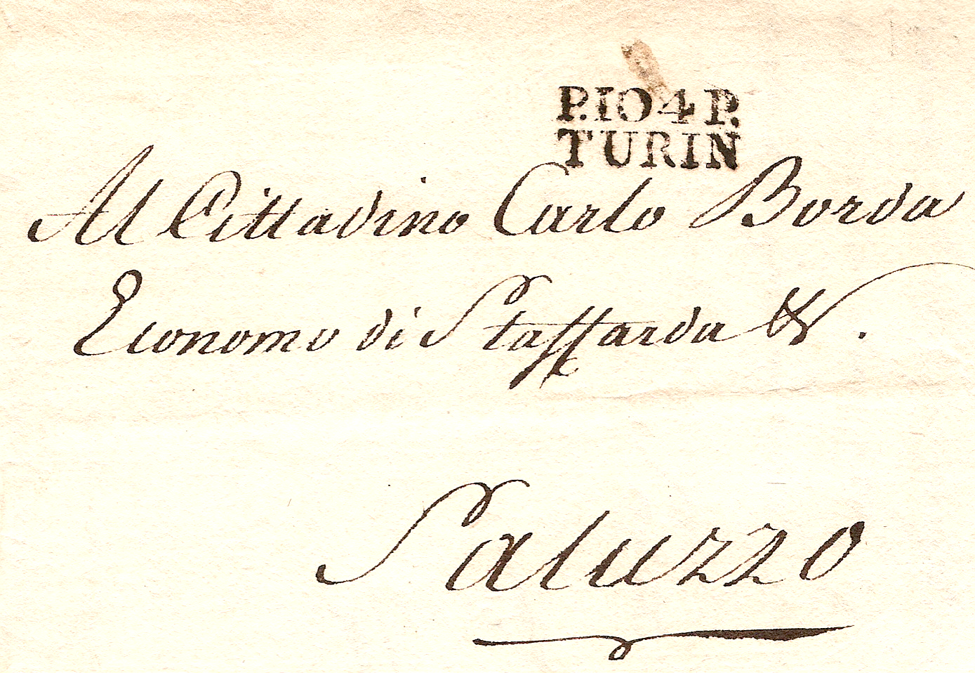 lettre de 1810 postée de Turin avec marque postale linéaire en Port Payé